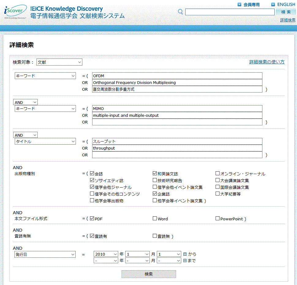 I-Scoverの詳細検索インタフェース